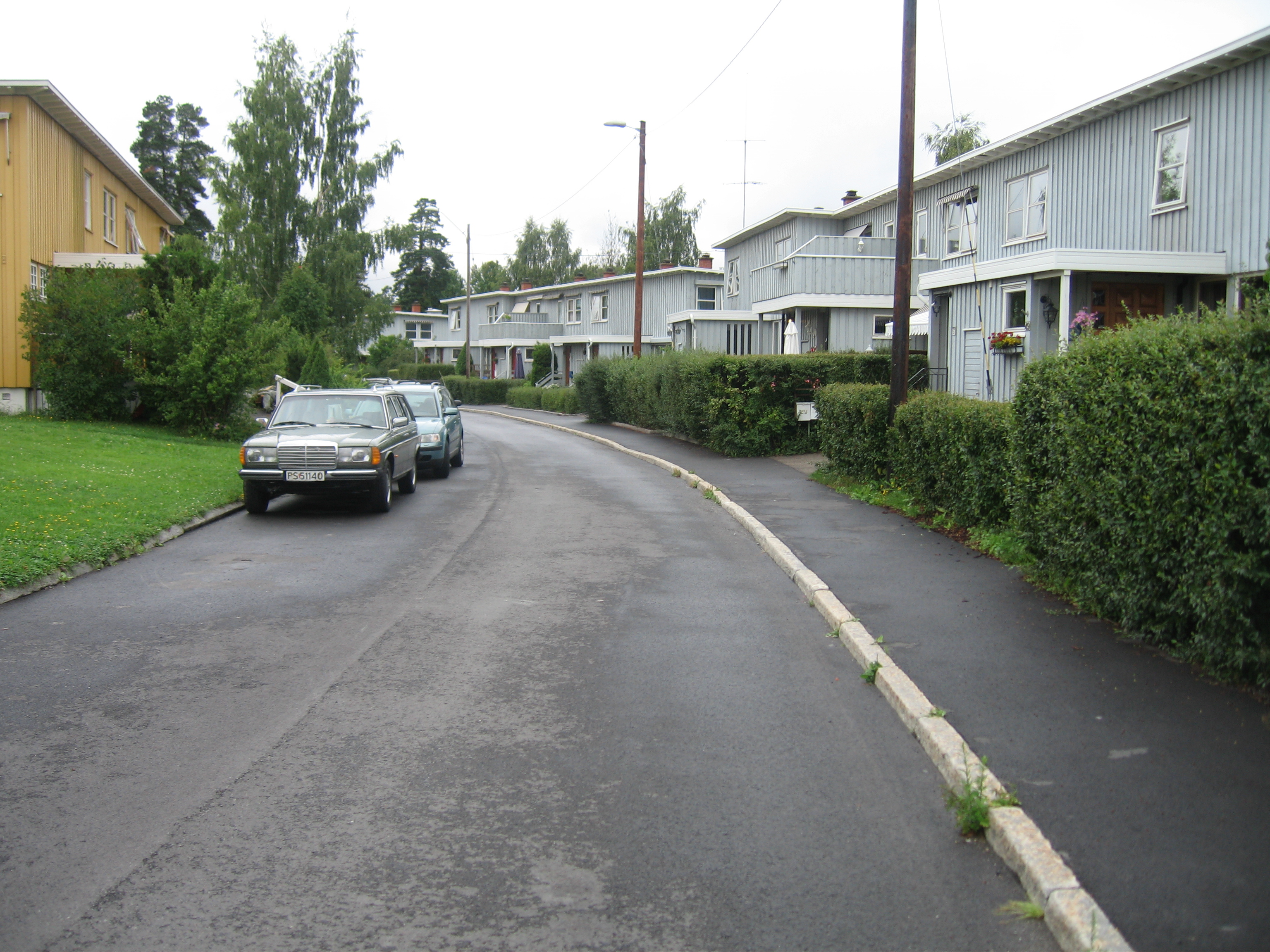 Tyristubbveien på Oppsal i Oslo.